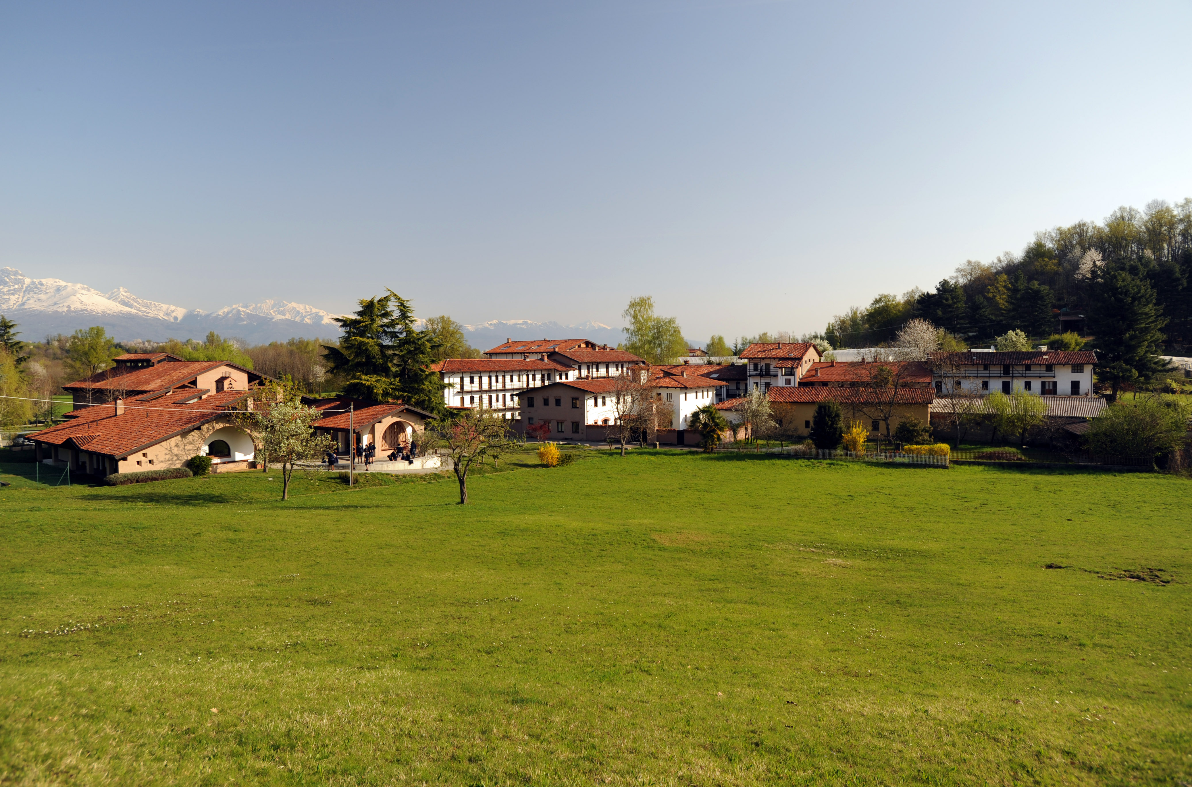 Vista della comunità dalla strada